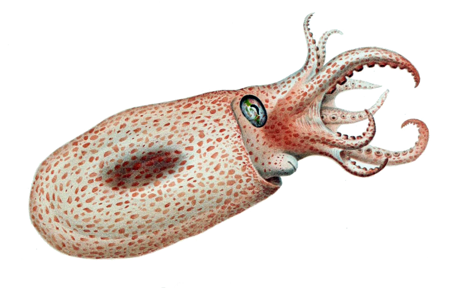 Japetella diaphana